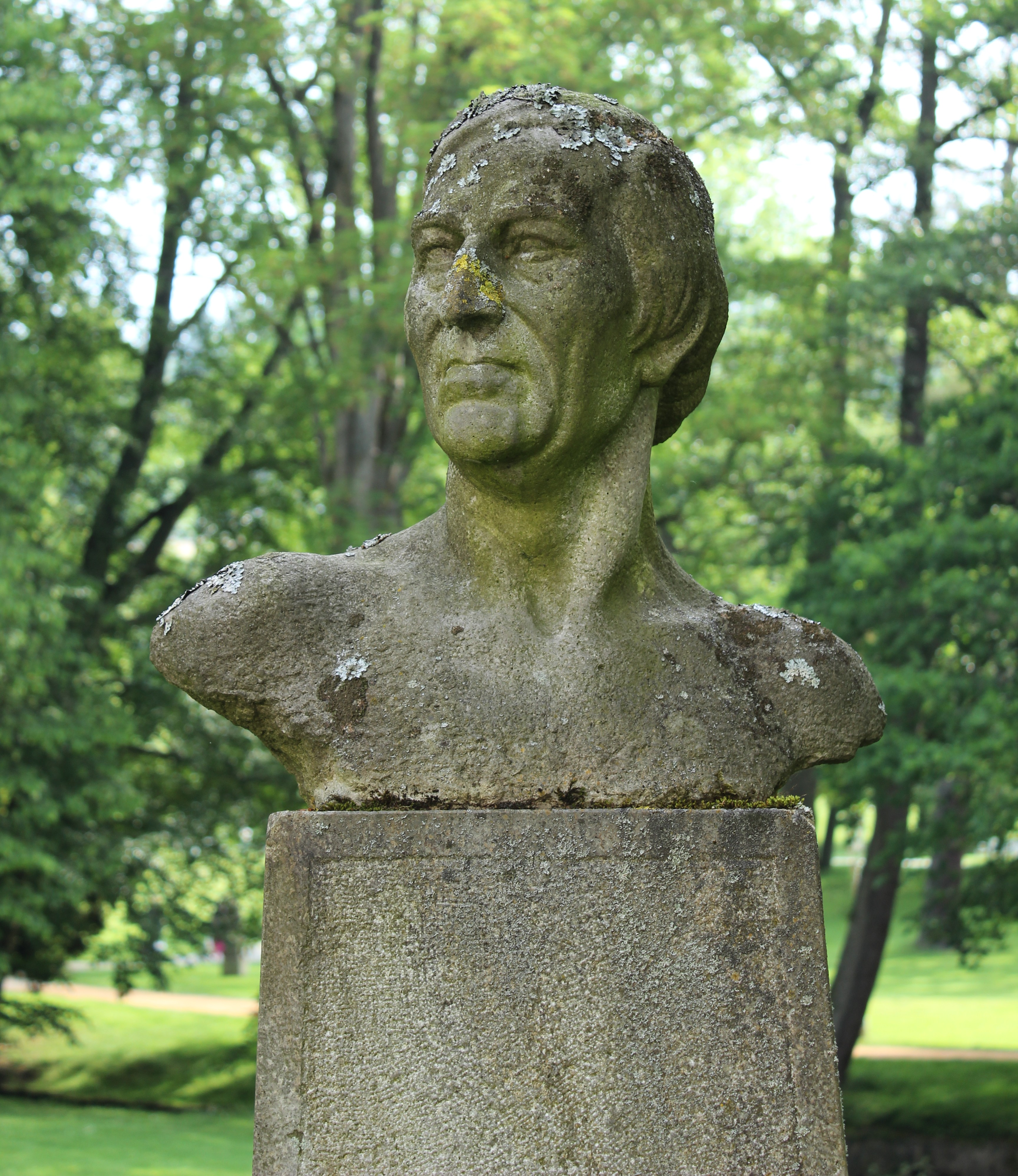 Busta Václava Skalníka na mariánskolázeňské Hlavní třídě.